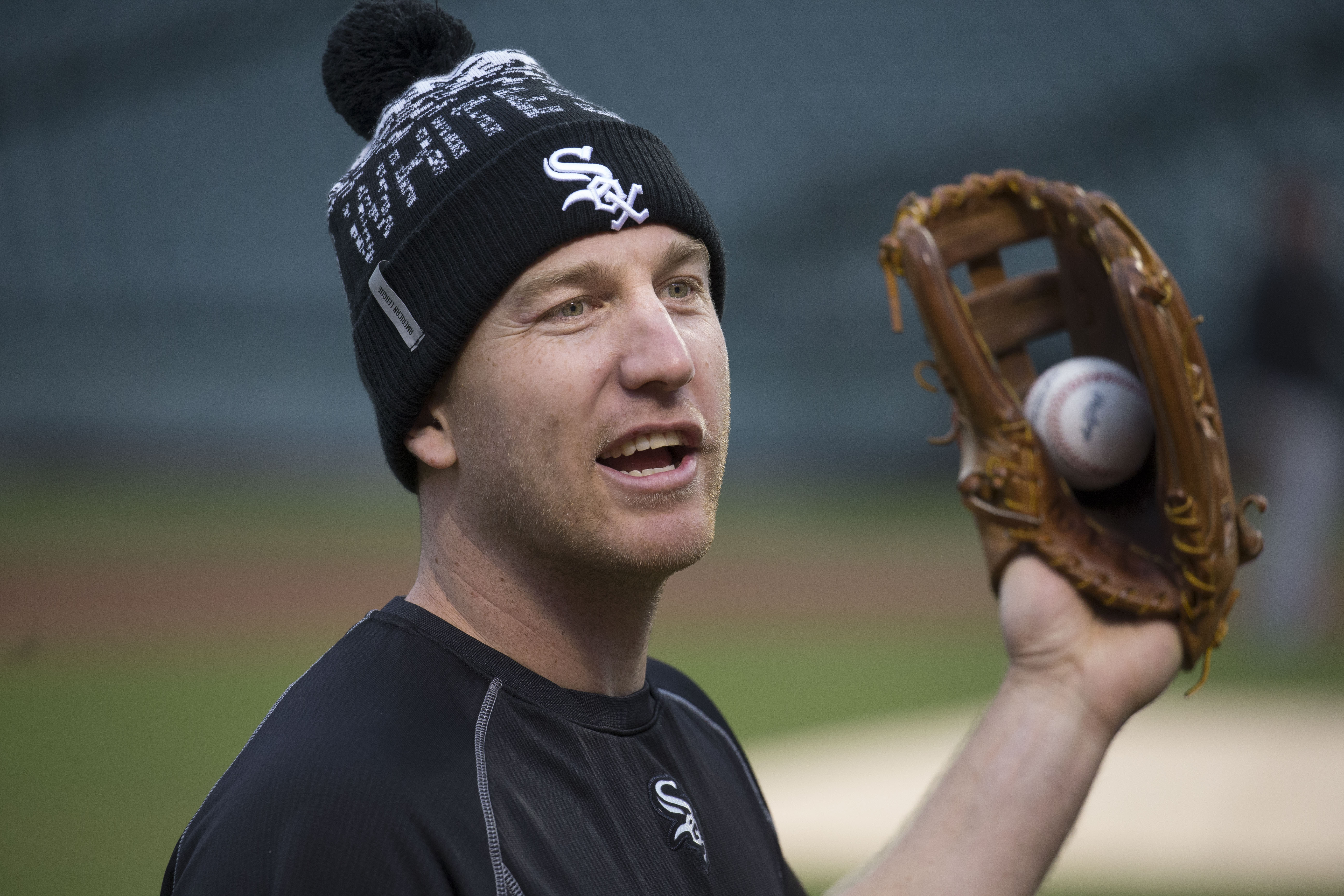 Todd Frazier